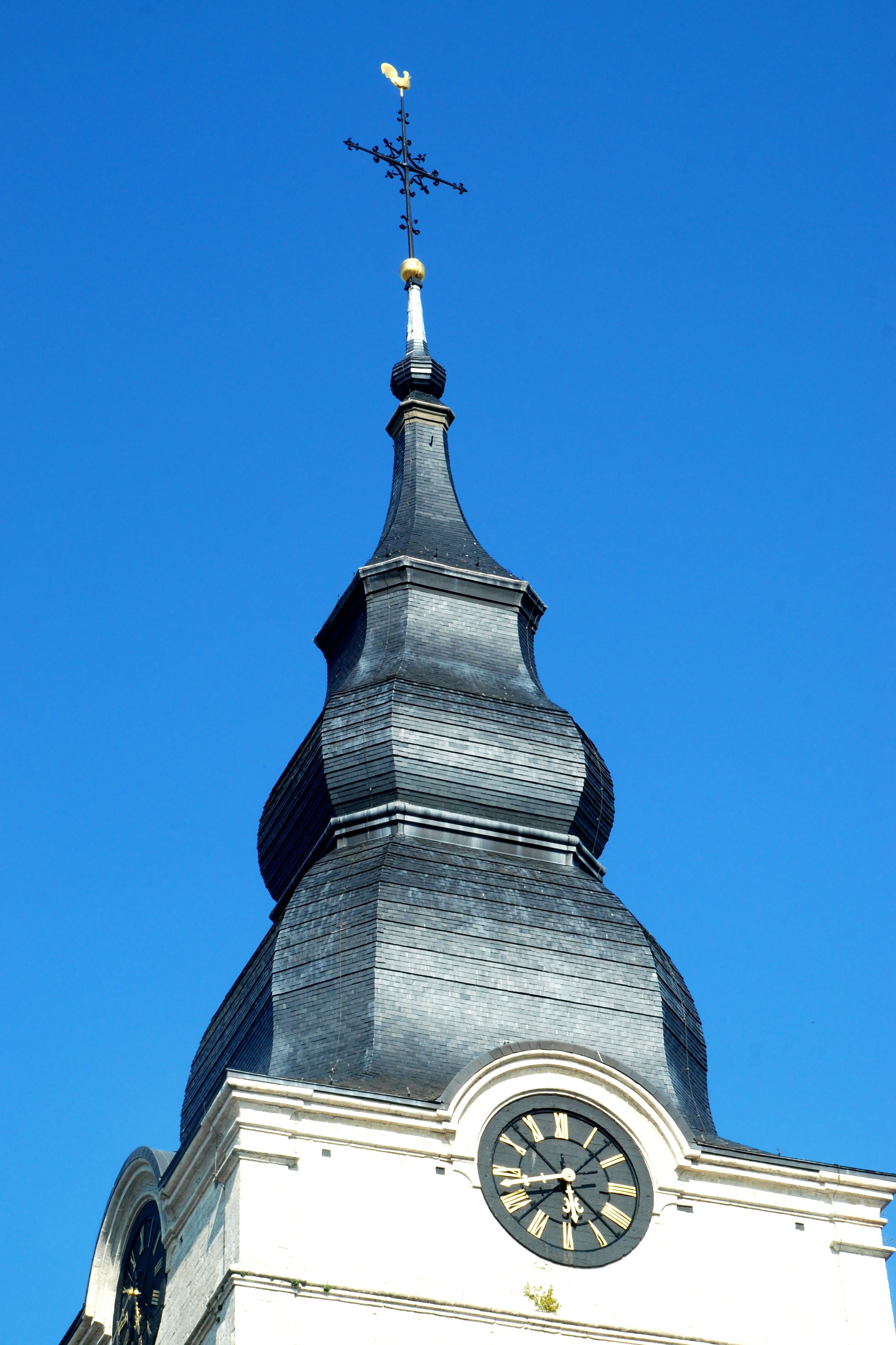 Belgique - Brabant flamand - Hoegaarden - Église Saint-Gorgon